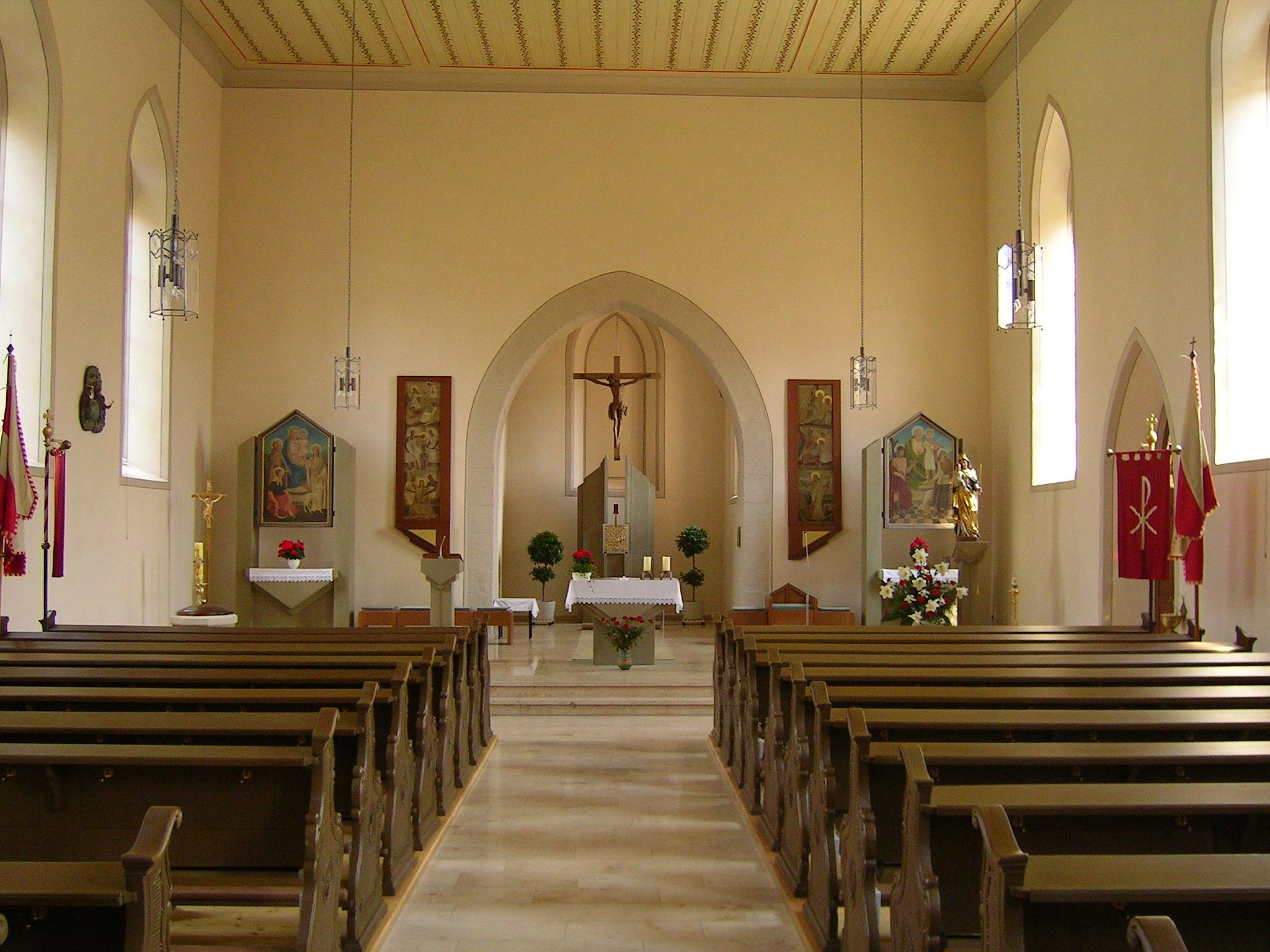 St. Nikolaus Kirchenraum (Steinach a. d. Saale)